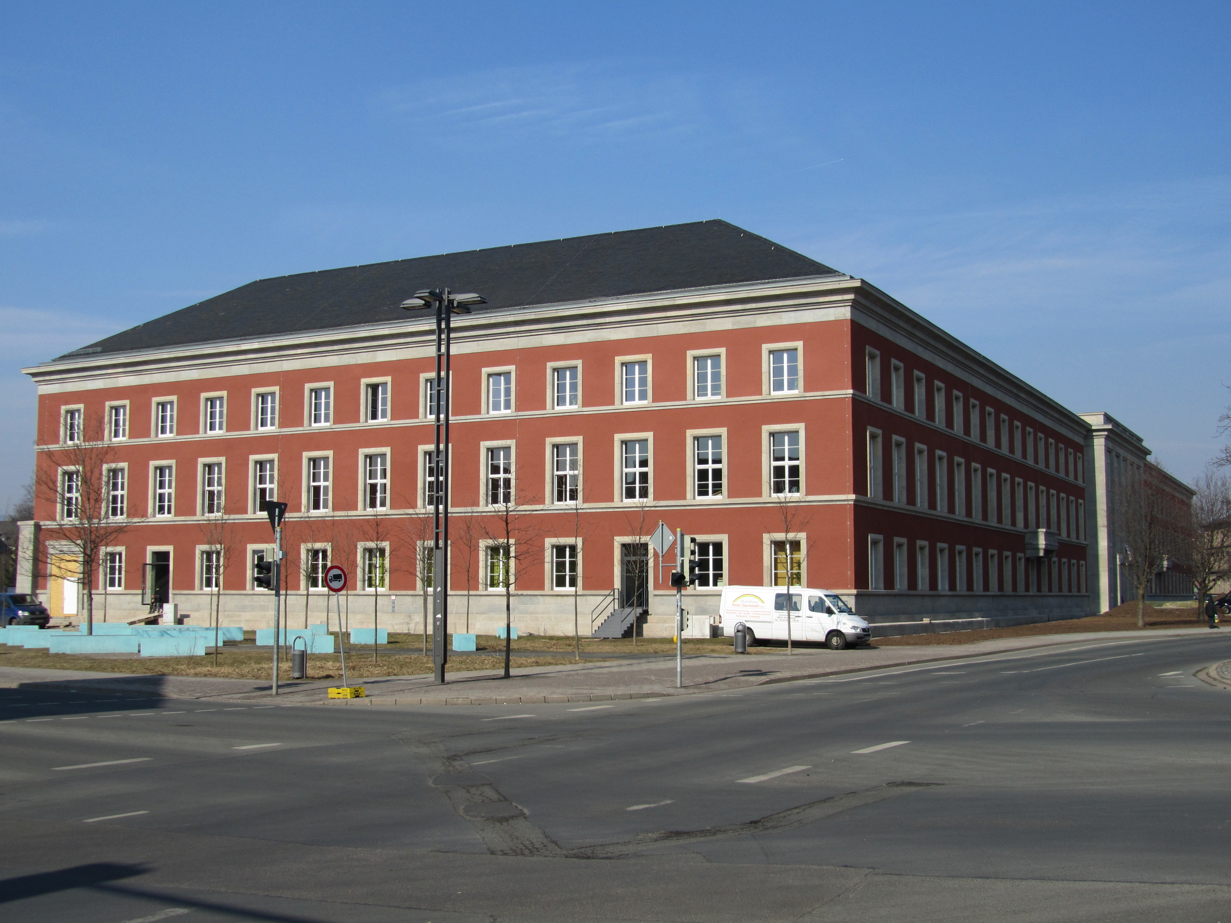 Das Gebäude an der Westseite des Gauforums in Weimar.